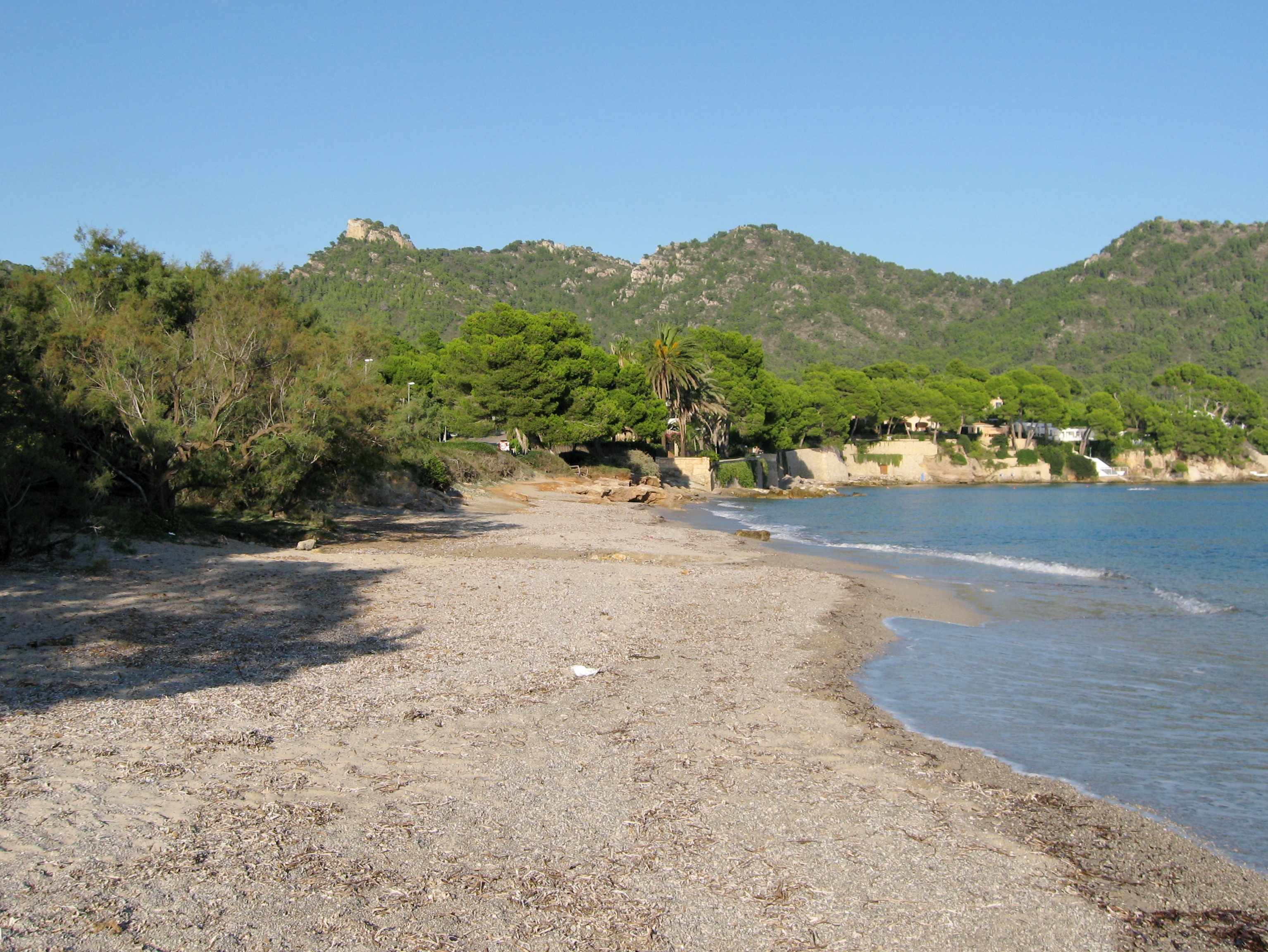 Es Ribell, Son Servera, Mallorca, Spain